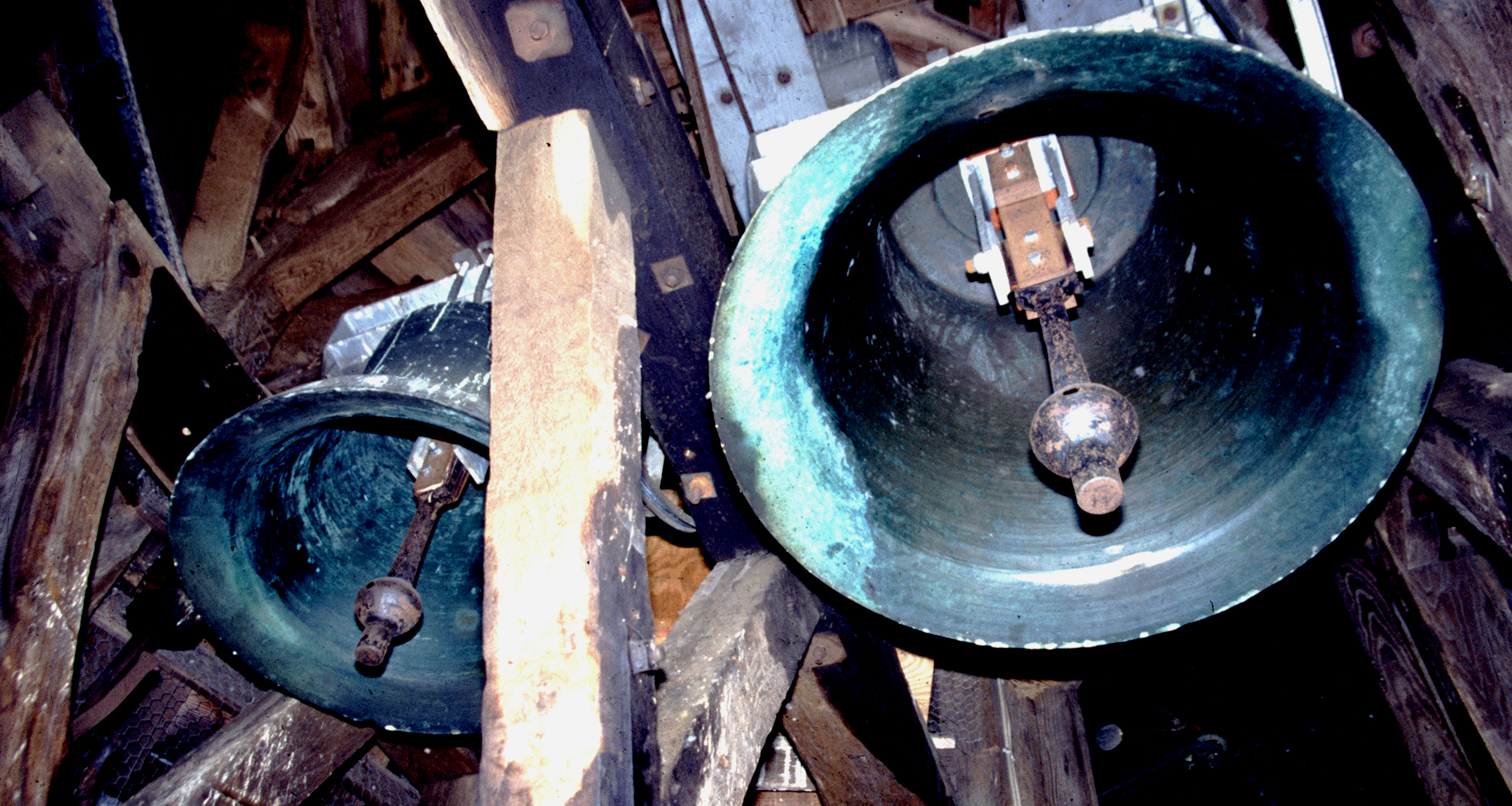 Evangelische Kirche Queckborn, Grünberg, Landkreis Gießen, Hessen, Deutschland